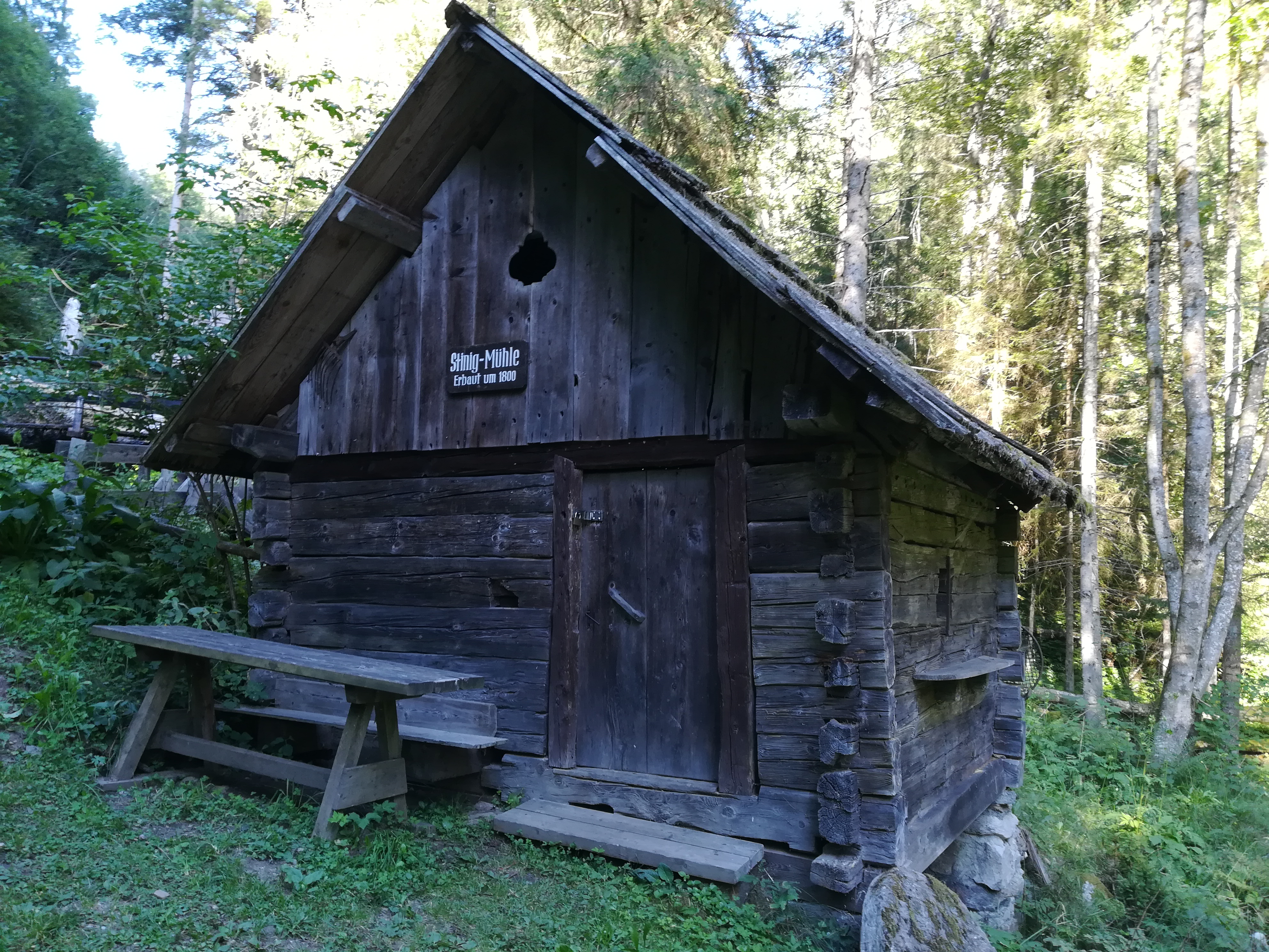 Stinigmühle in Kaning bzw. am Kaninger Mühlenwanderweg. Um 1800 erbaut.